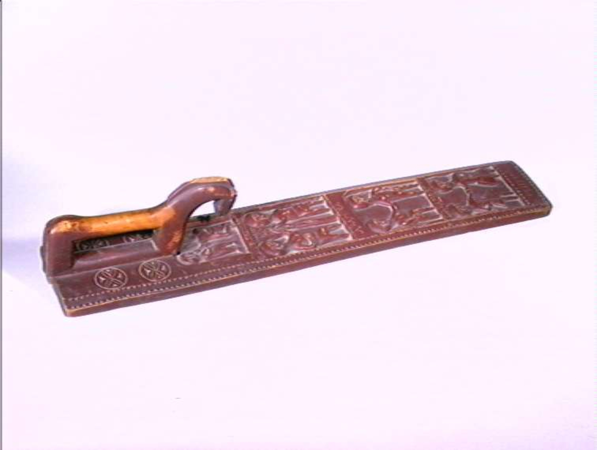 Mangletre fra ukjent sted i Norge. Billedfremstilling av Adam og Eva og utdrivelsen fra paradis. Norsk Folkemuseum. NF.1896-0592.